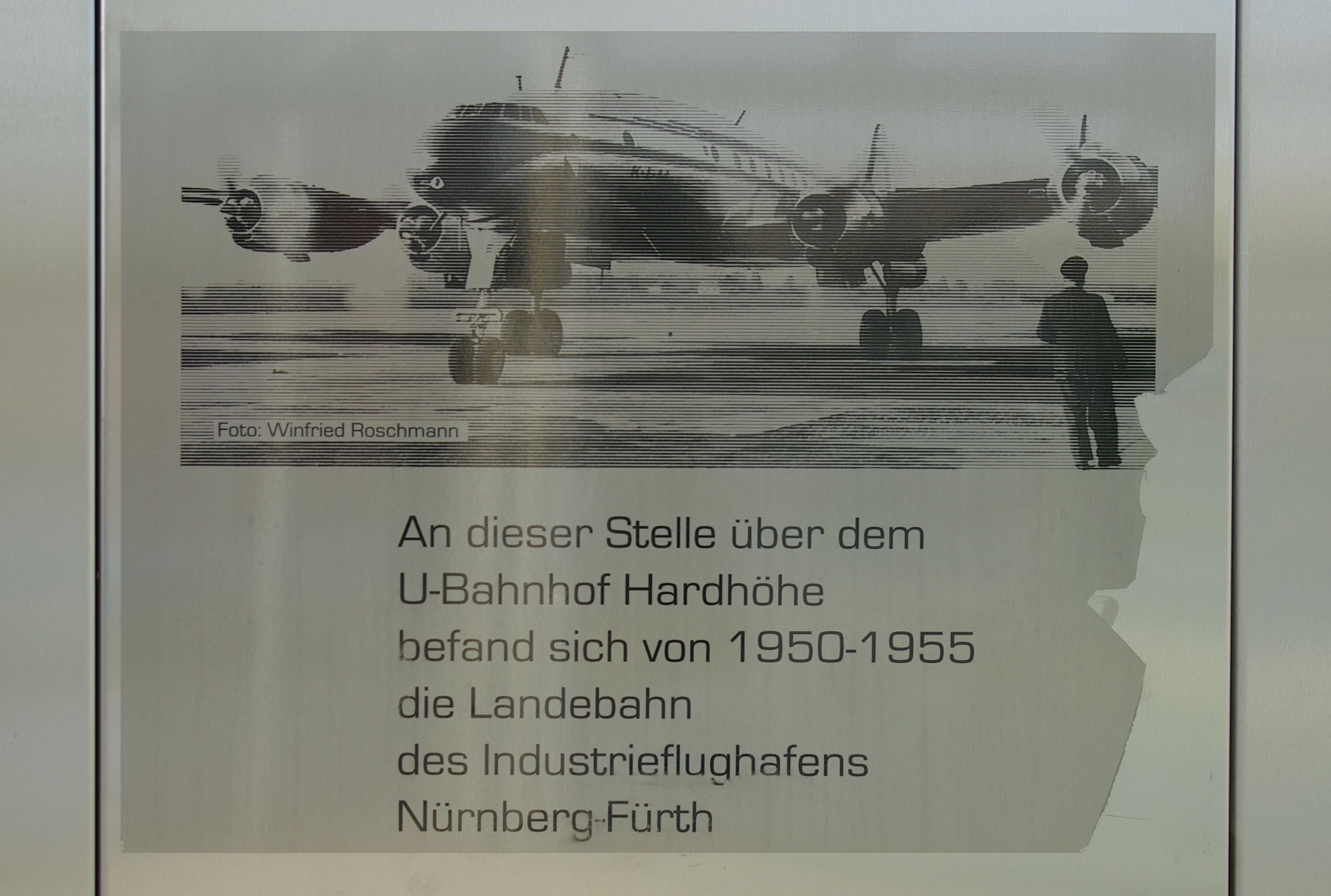 Gedenktafel für den Industrieflughafen am heutigen U-Bahnhof Hardhöhe in Fürth